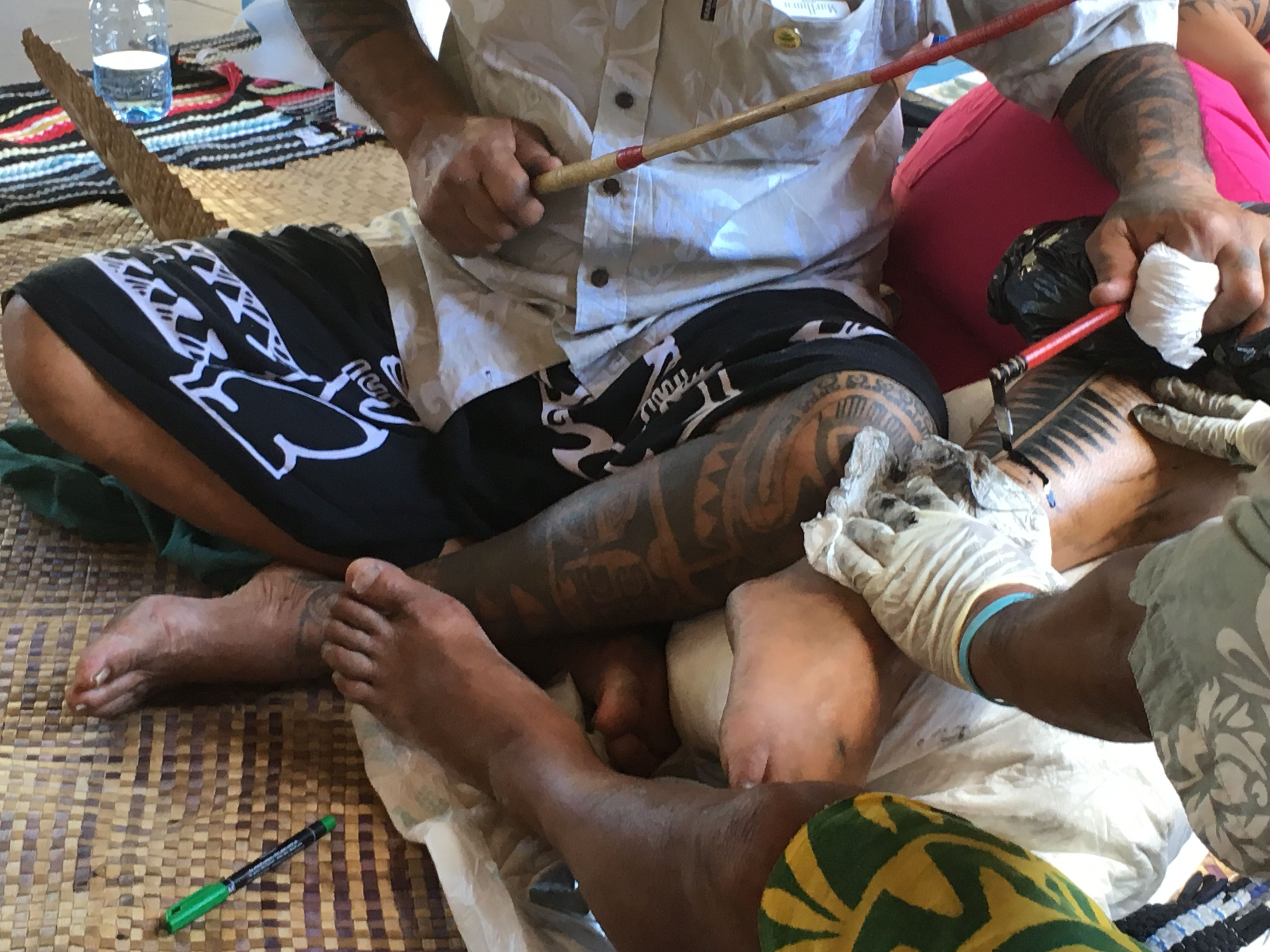 Tatouage traditionnel Tahiti